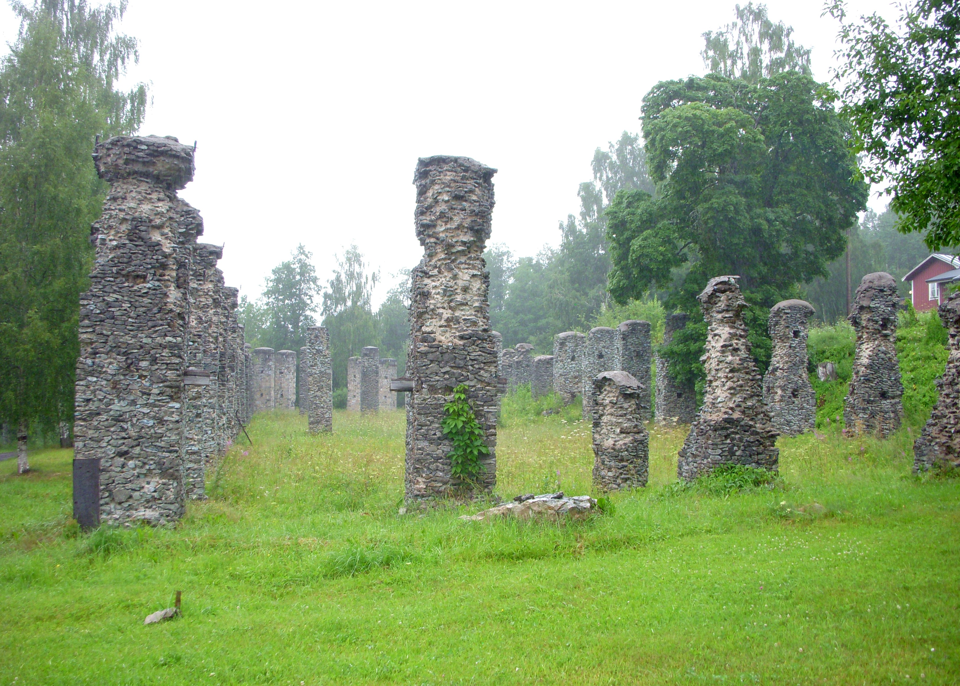 Kolhusruinen, Ulfshyttan